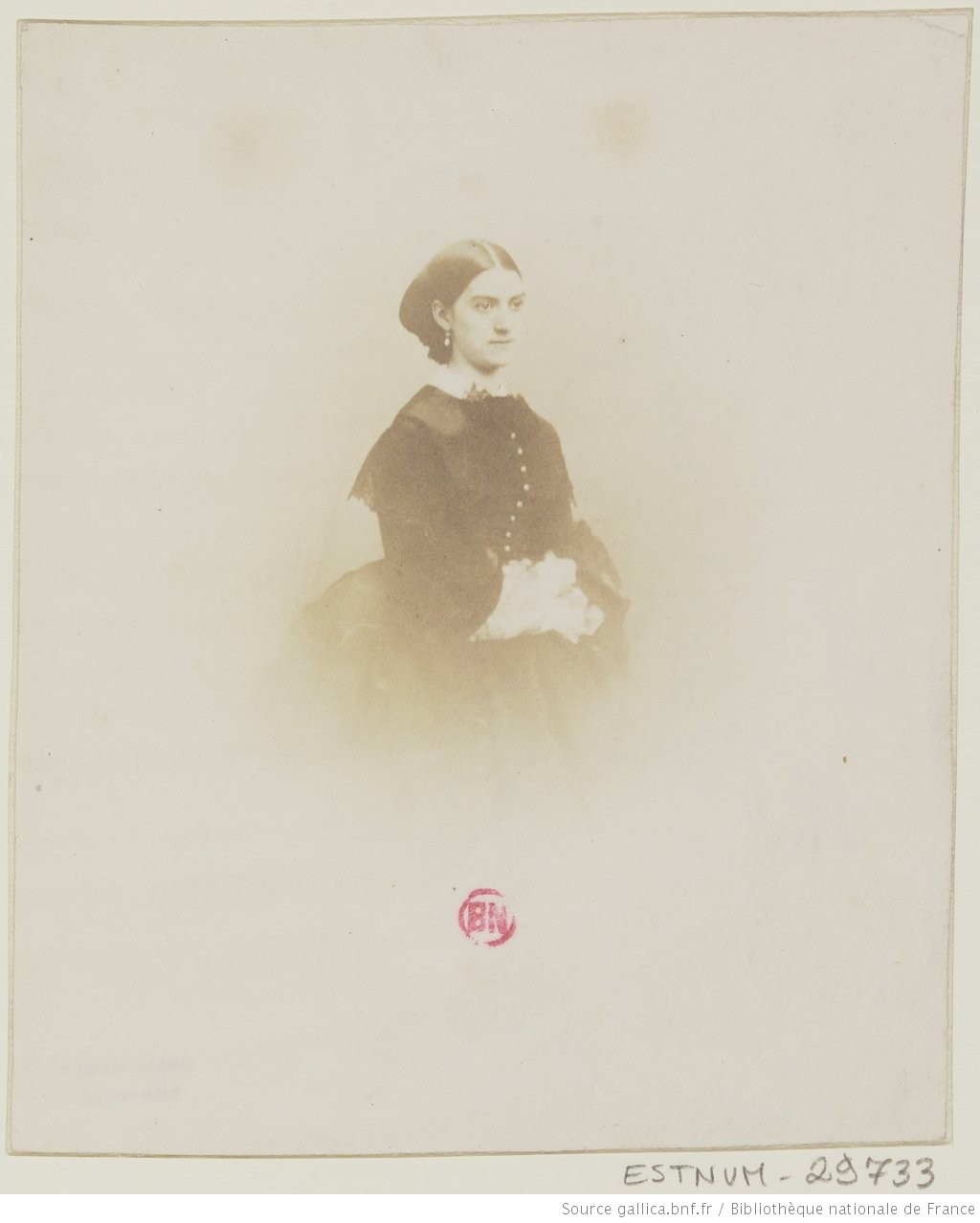 Constance Quéniaux by Nadar Titolo : Melle Queniaux, opéra (ballet) : [photographie] / [Nadar] Autore : Nadar (1820-1910). Photographe Data di edizione : 1854-1870 Argomento : Queniaux, Constance (1831?-1908) -- Portraits Argomento : Portraits -- 1800-1869 Tipo : image fixe Tipo : photographie Formato : 1 photogr. pos. : papier salé : d'après négatif sur plaque de verre ; 11,8 x 9,8 cm Formato : image/jpeg Formato : Nombre total de vues : 2 Diritti : domaine public Identificativo : ark:/12148/btv1b10535757j Segnatura : Bibliothèque nationale de France, département Estampes et photographie, PET FOL-EO-15 (12) Relazione : Notice de recueil : Relazione : Appartient à : [Recueil. Photographies positives. Oeuvre de Félix Nadar] Relazione : Provenienza : Bibliothèque nationale de France Data di pubblicazione online : 11/04/2016